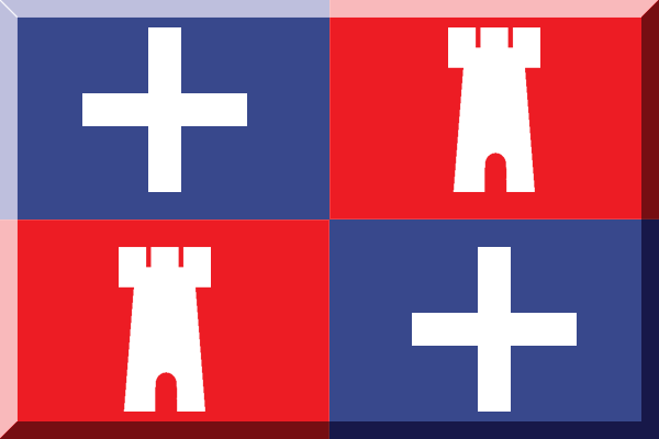 bandiera tridimensionale a quarti rossi e blu con croci e torri bianche